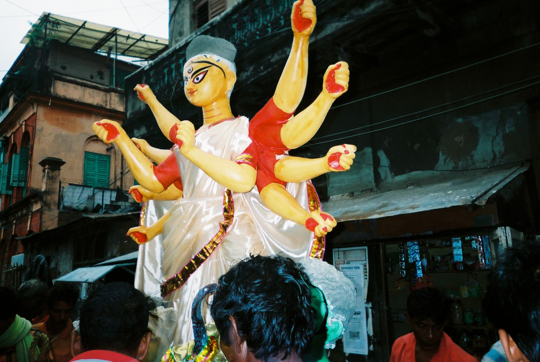 Kumortuli theke pandeler pothe devi Durga.